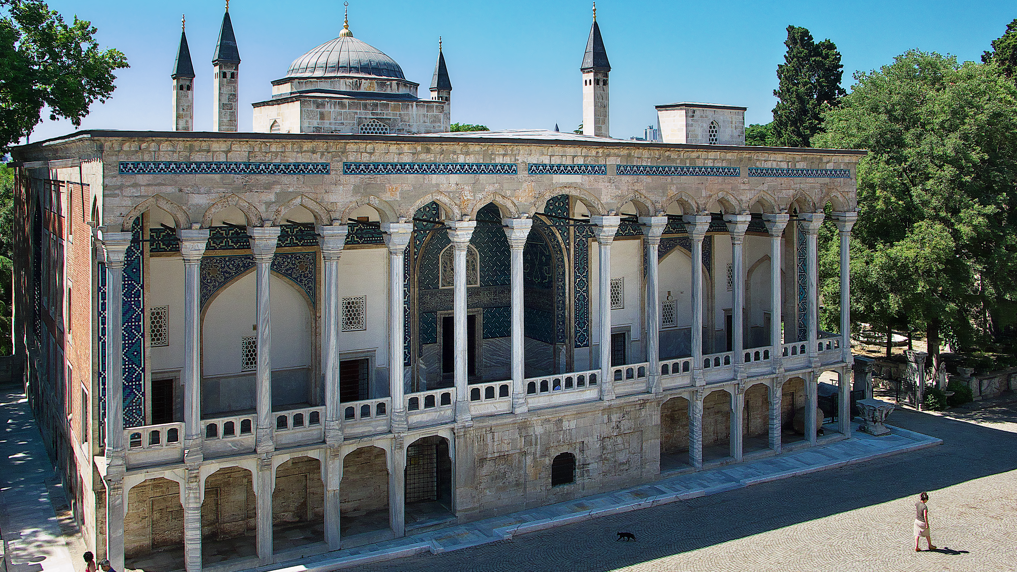 Çinili Kösk Müzesi. Actual museo de cerámica y azulejos turcos e islámicos. Pabellón construido por Mehmed II (Mehmed II el-Fātiḥ) (1466)